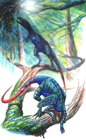 Scleromochlus